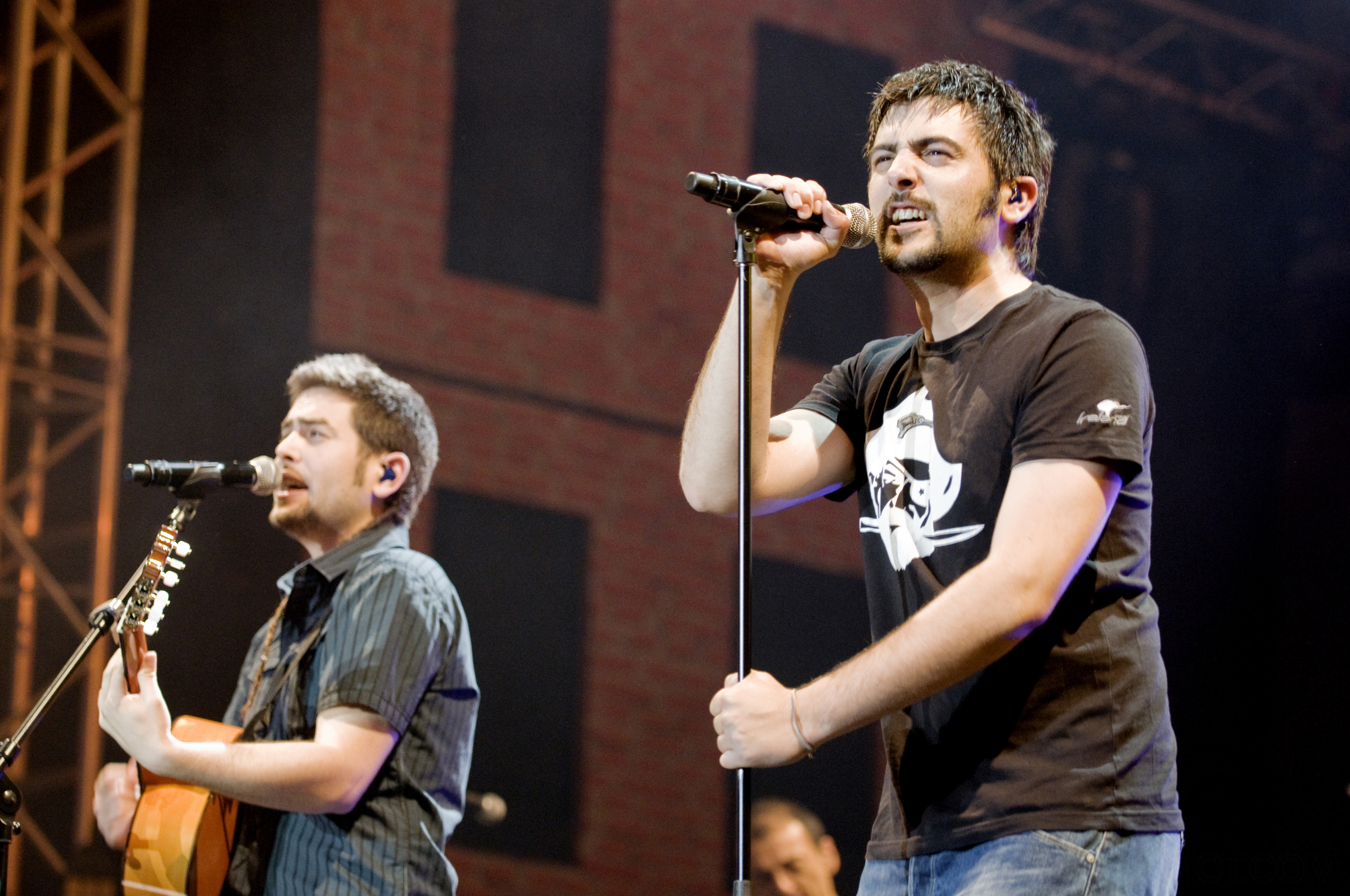 Estopa